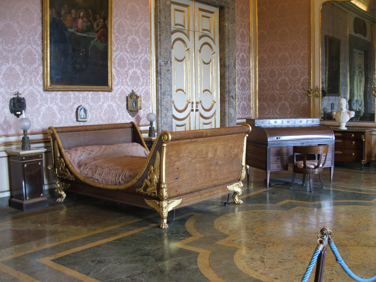 Caserta, immagini dalla Reggia di Caserta